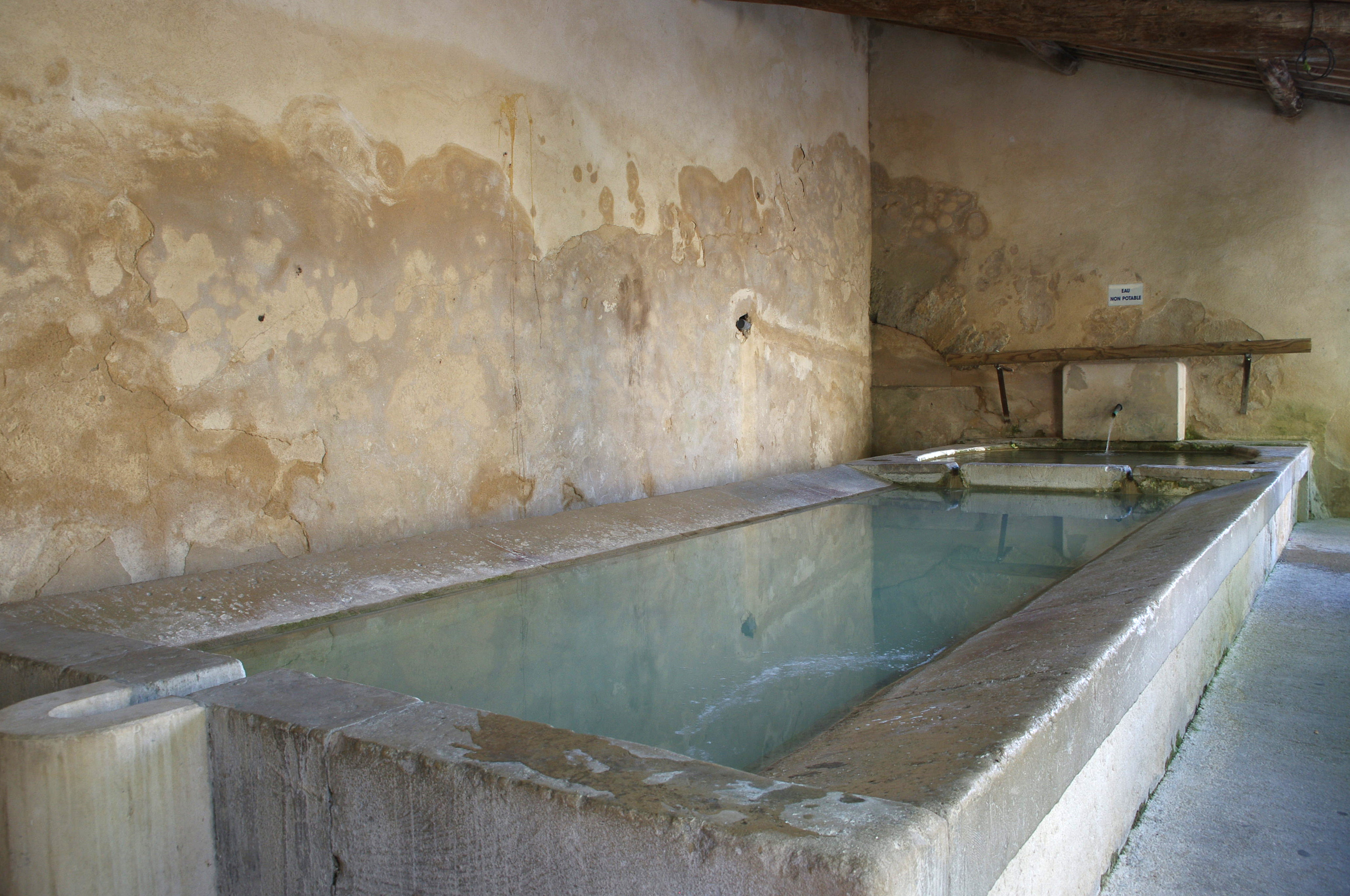 Lauris, Vaucluse, France.